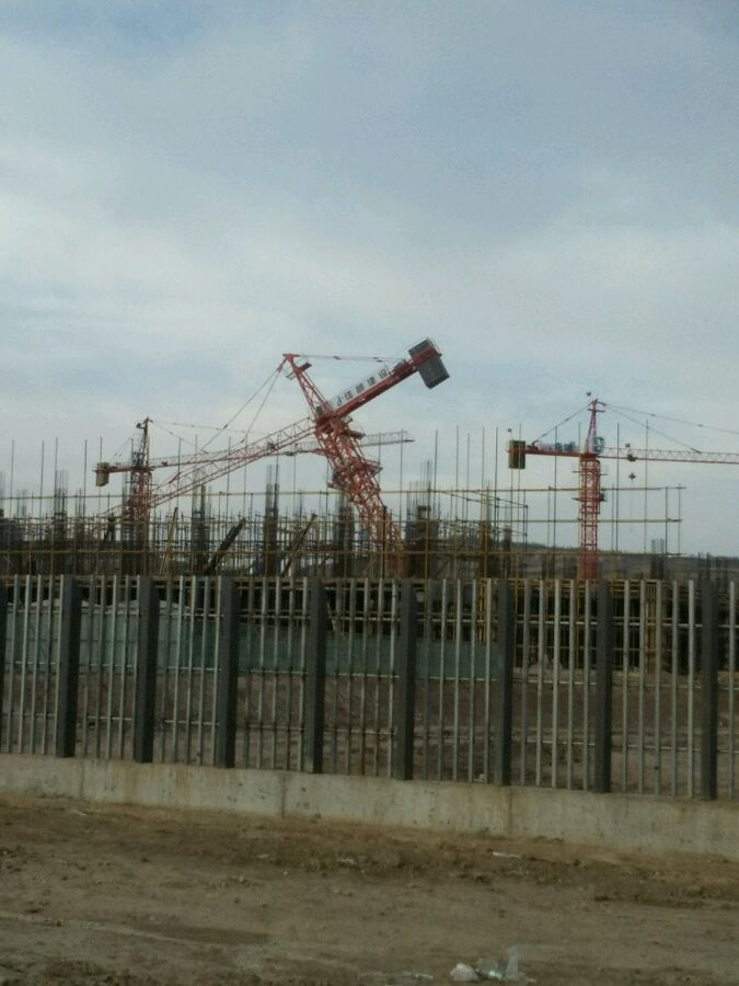 这是我自己拍摄的作品，授权维基百科使用。